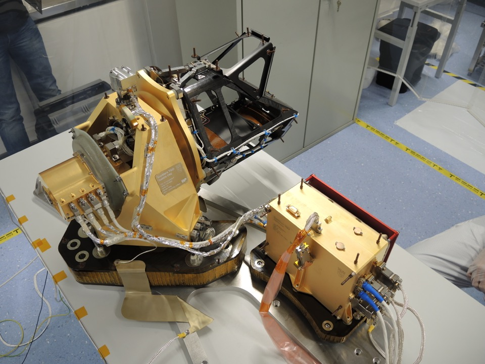 Фотография научного инструмента CaSSIS, который размещён на орбитальном модуле TGO миссии ExoMars